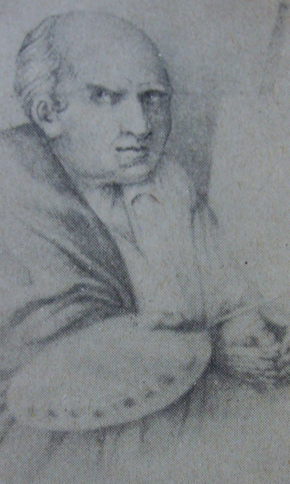 Dibujo del pintor poblano Miguel Jerónimo Zendejas